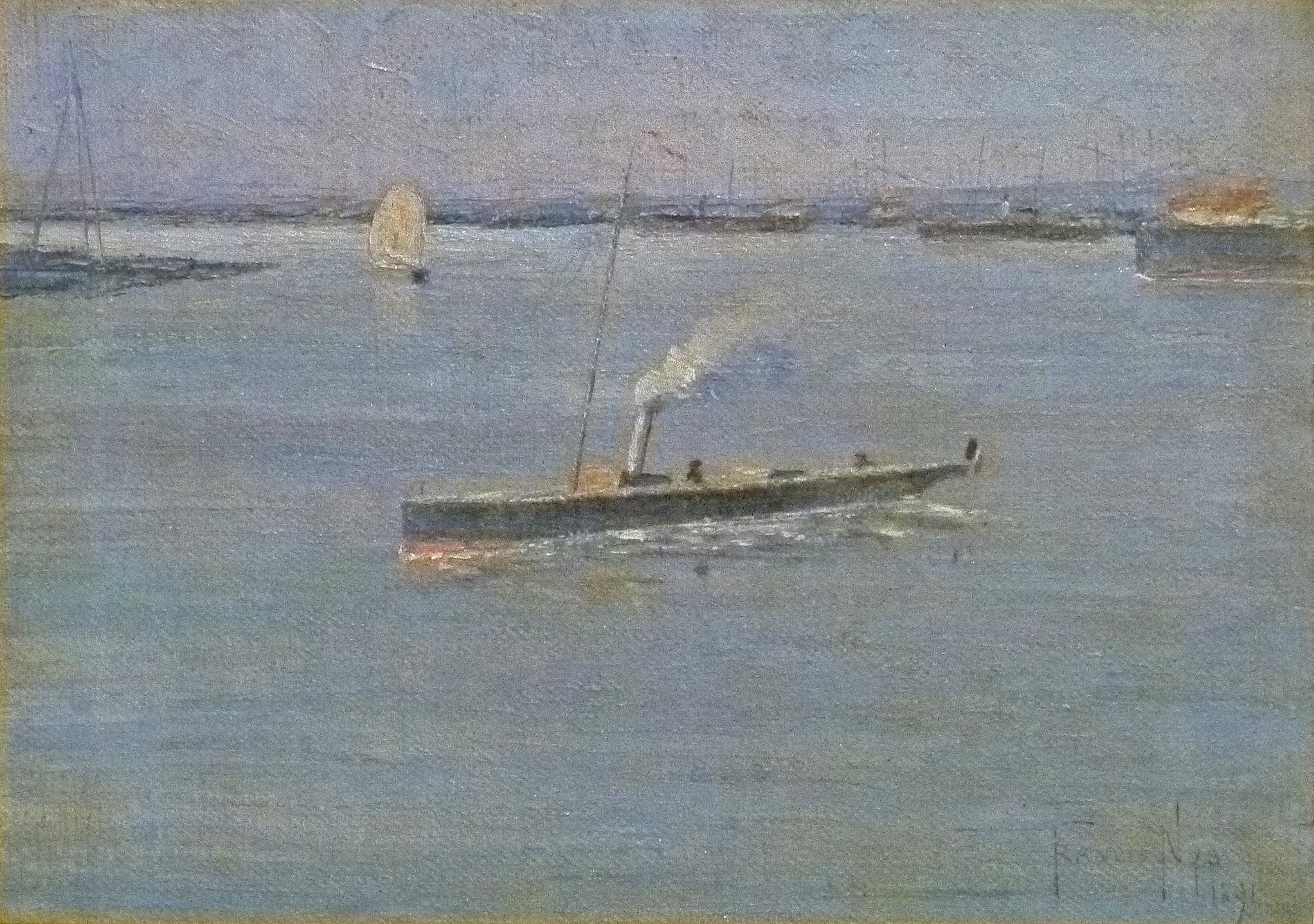 "Havenzicht met stoomboot" (1891); olieverf op doek 25x 33 cm door de Belgische kunstschilder Francis Nys (1863-1900); privébezit